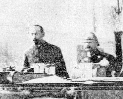 Jacobus van Munster